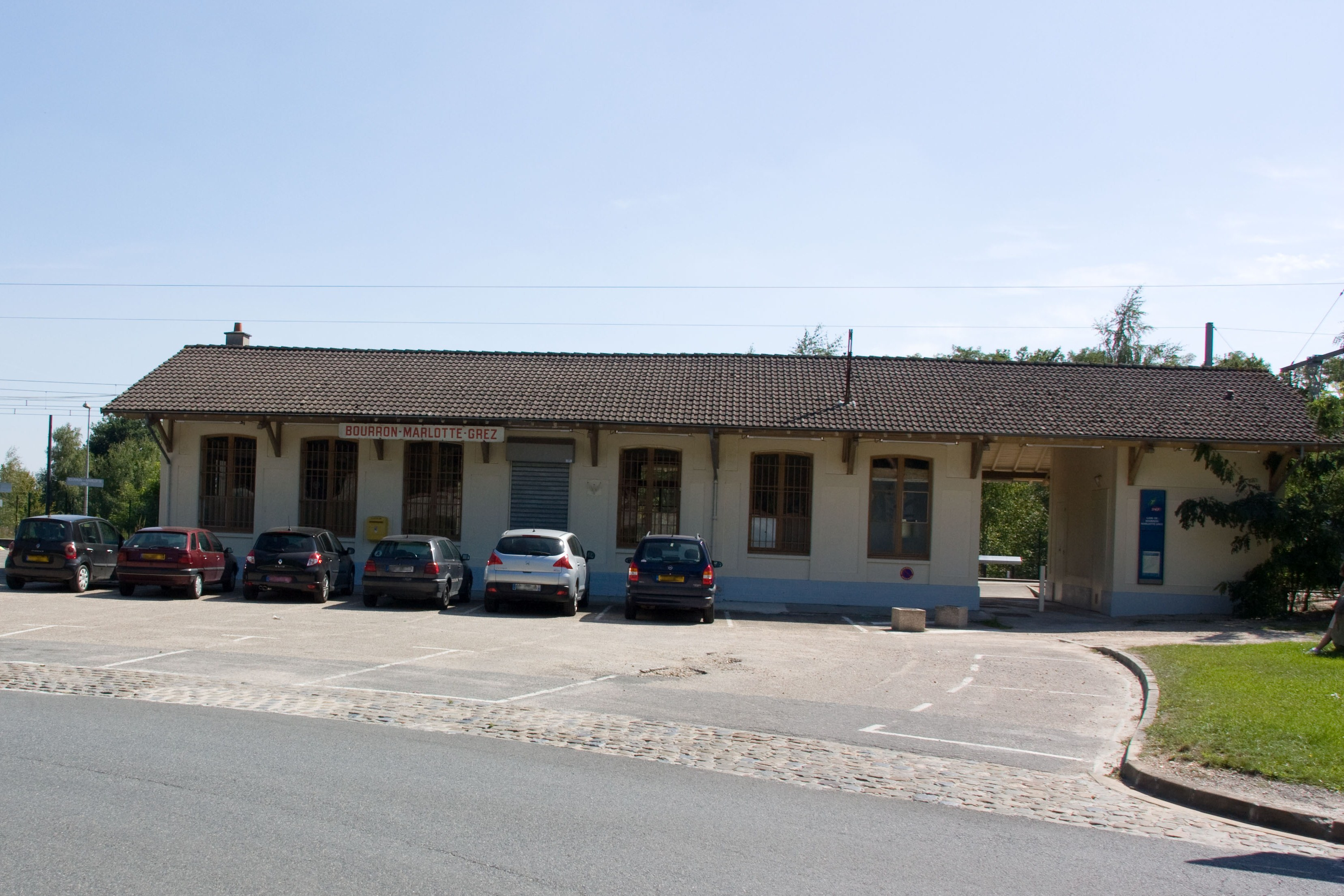 Gare de Bourron-Marlotte - Grez. Montigny-sur-Loing, Seine-et-Marne, France.